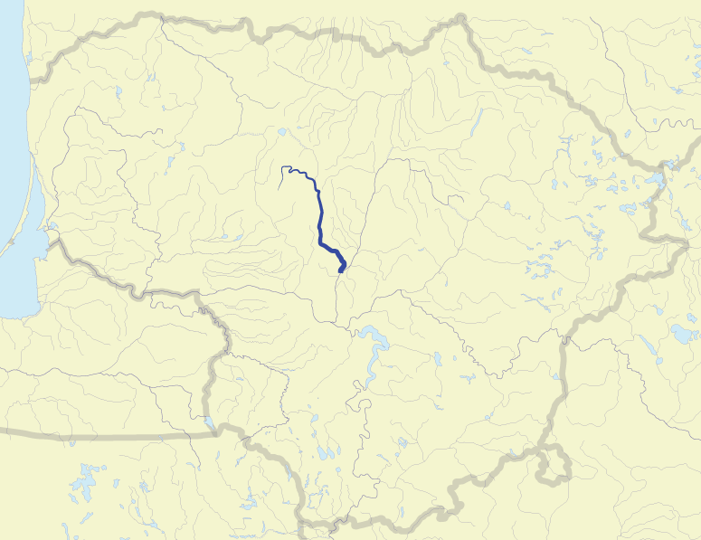 River Šušvė